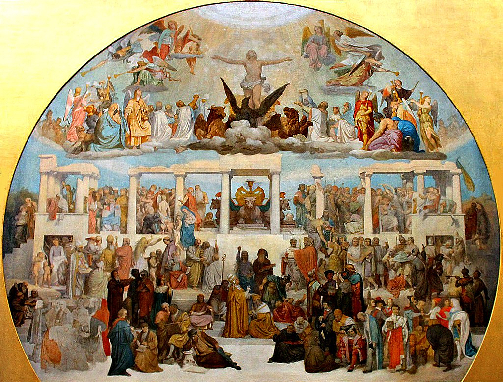 carton pour la mosaïque destinée au sol du Panthéon, sous la coupole. Ce projet n'a jamais été exécuté.